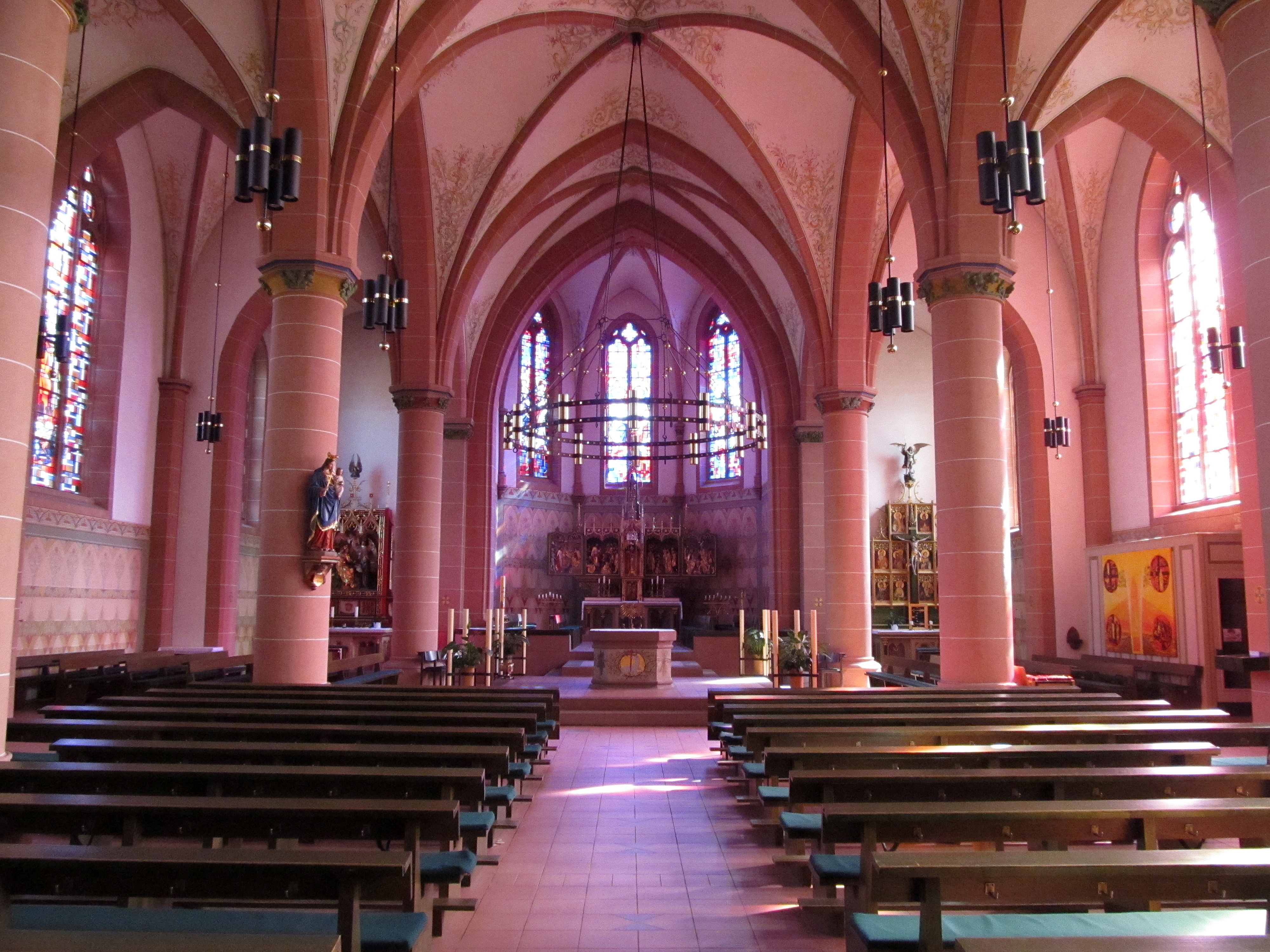 Blick ins Innere der katholischen Pfarrkirche St. Michael in Wemmetsweiler, Gemeinde Merchweiler, Saarland